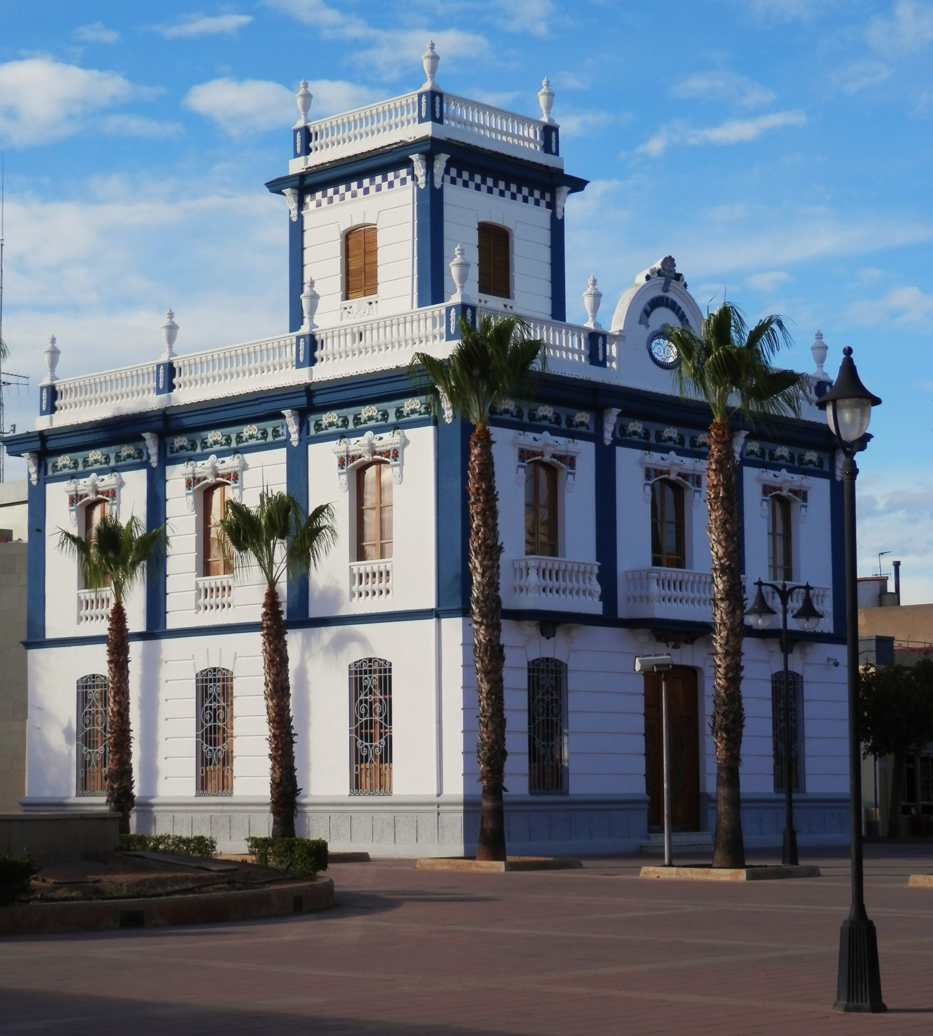 Xalet de Safont, ajuntament de les Alqueries.